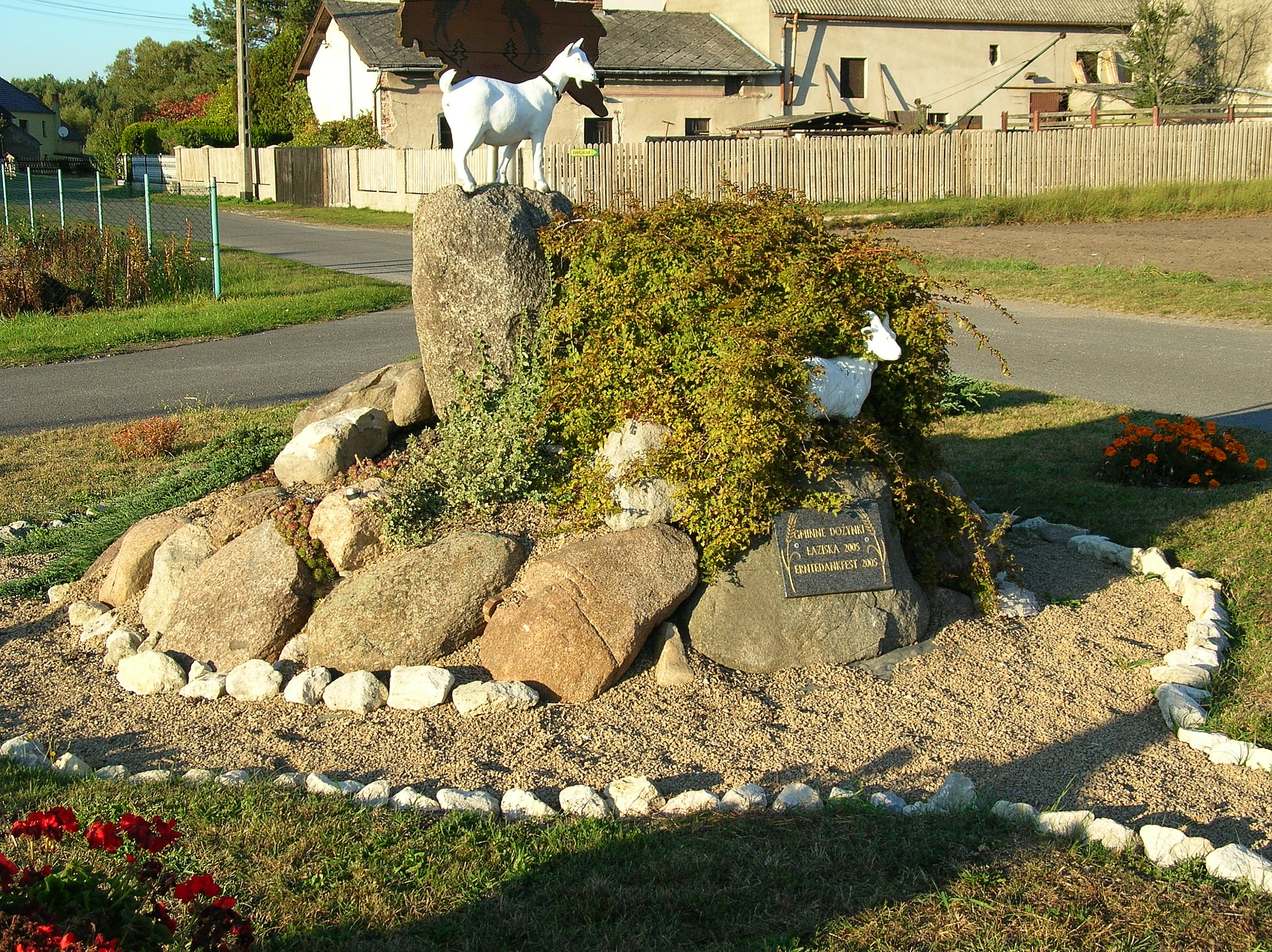 Pomnik dożynek z 2005 r. we wsi Łaziska w gminie Jemielnica.